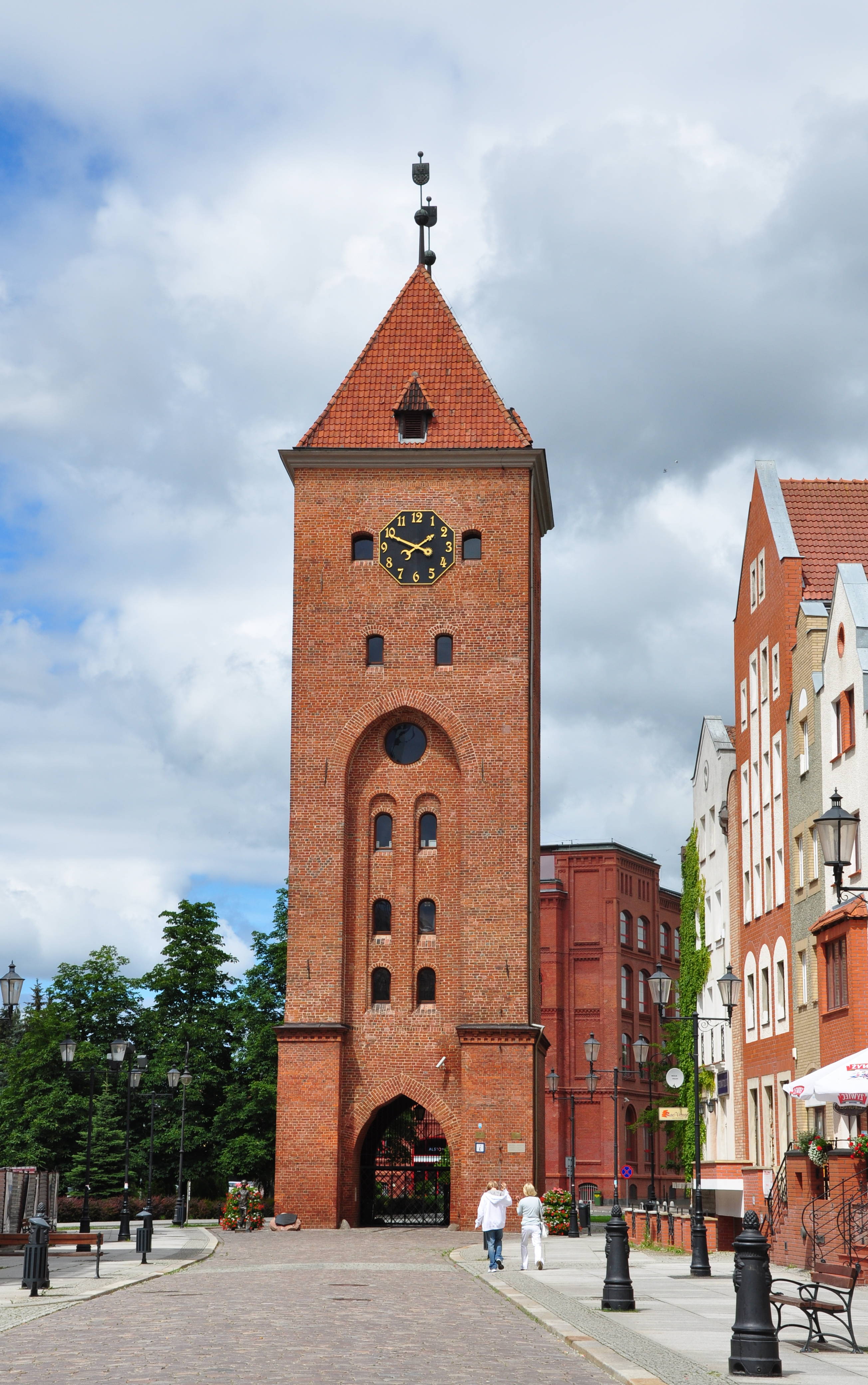 Brama Targowa w Elblągu (wieża zegarowa)